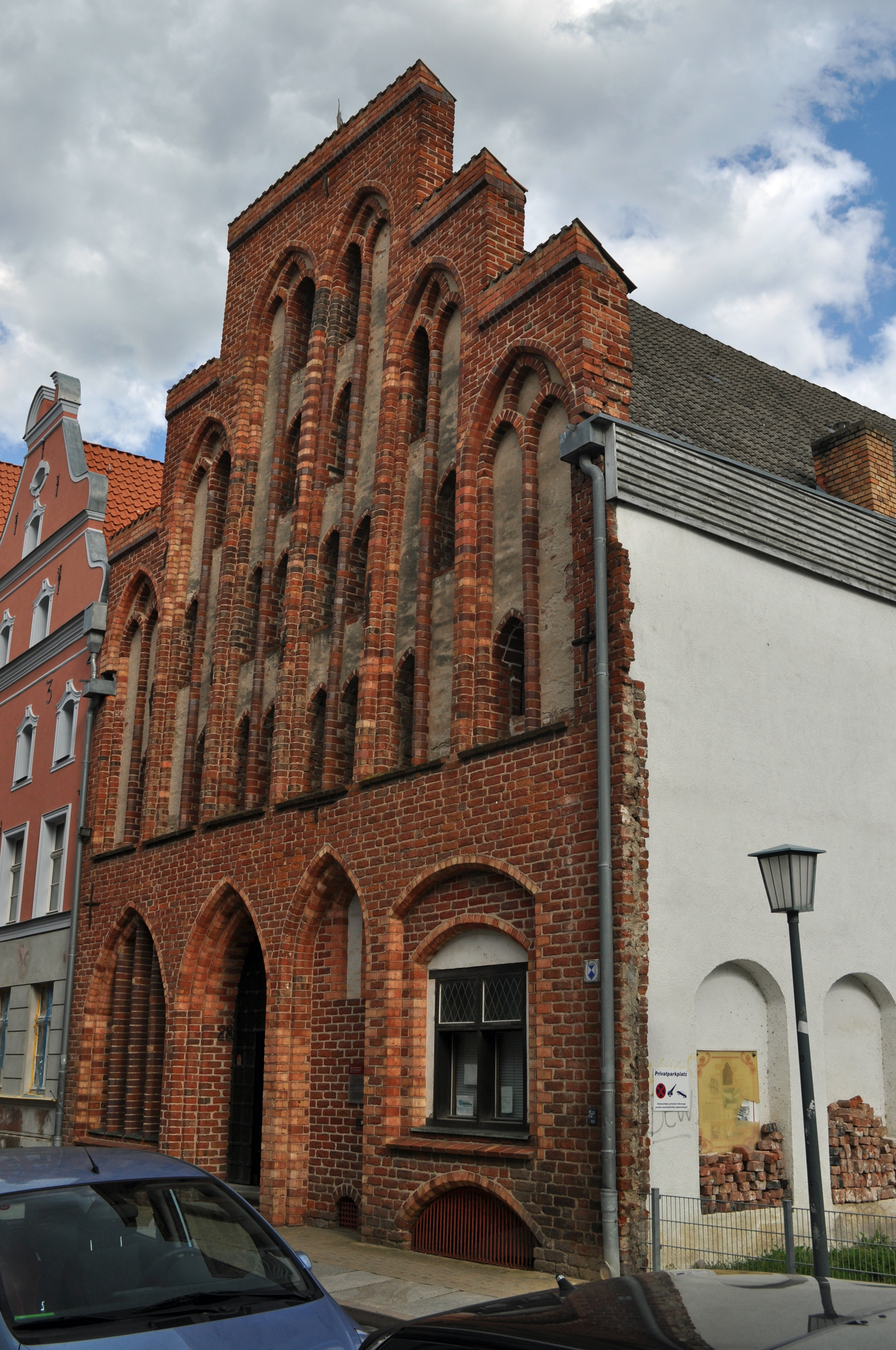 Das Foto zeigt ein Haus (bzw. Details des Hauses) in der Frankenstraße in Stralsund, Deutschland. Die Hausnummer steht im Dateinamen. Aufgenommen am 19. Juli 2011 vom Benutzer:Klugschnacker.